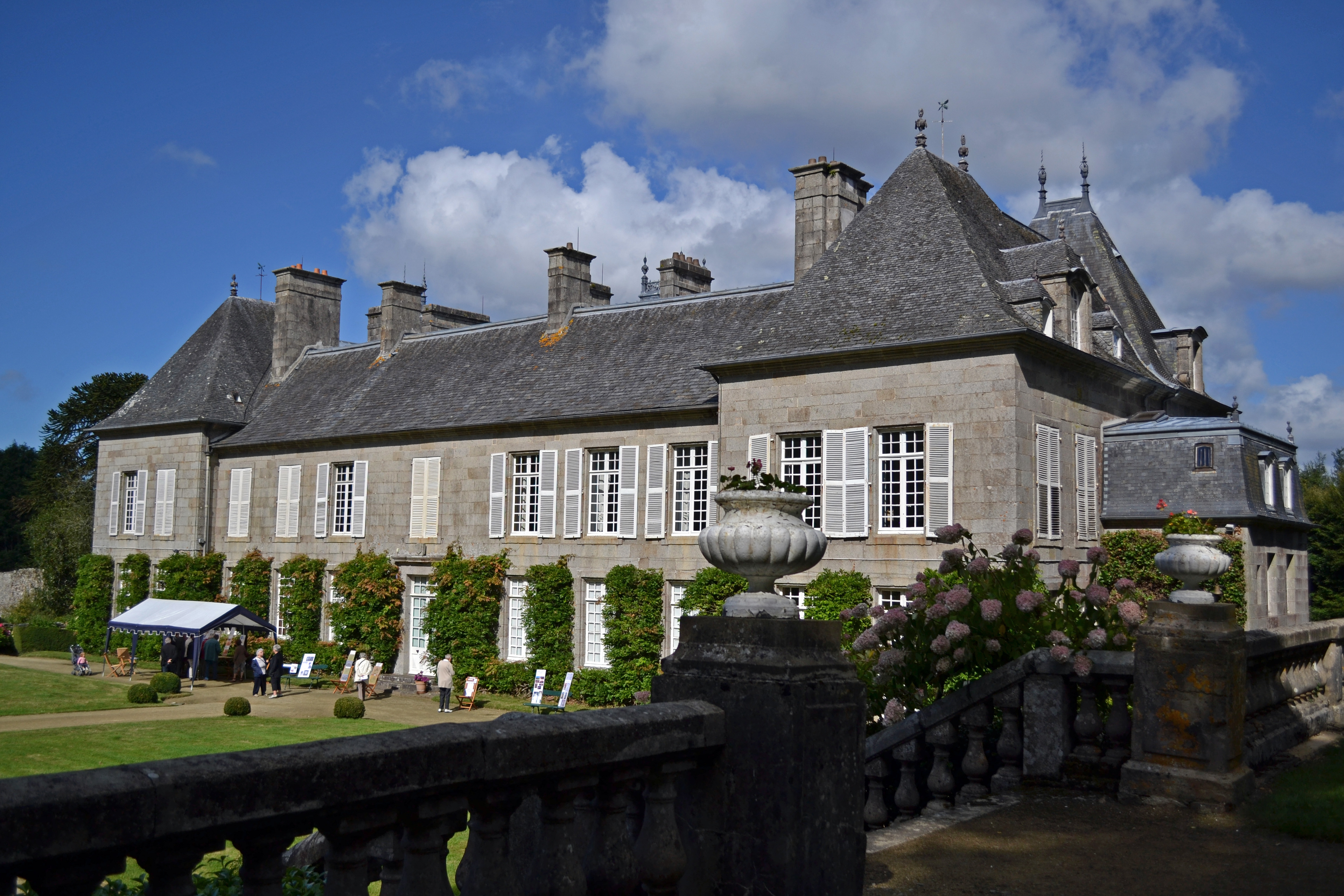 Château de Lesquiffiou du XVIIe siècle et son jardin à la française à Pleyber-Christ (Finistère). .